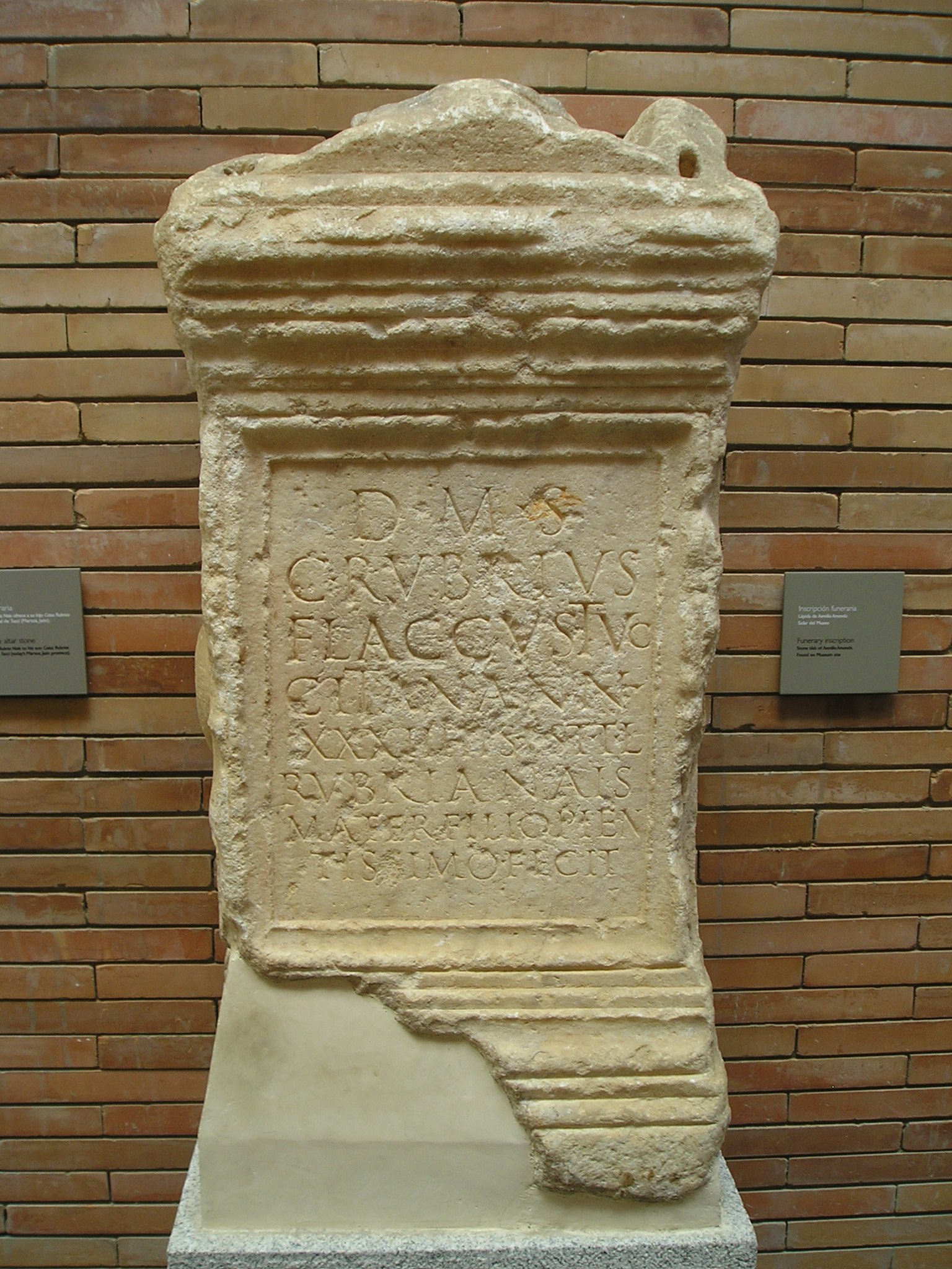 Inscripción funeraria romana procedente de Mérida (Badajoz, España), depositada en el Museo Nacional de Arte Romano de la localidad, correspondiente con CIL II 522 = EE VIII, 362: D(is) M(anibus) s(acrum) / C(aius) Rubrius / Flaccus Tuc/citan(us) ann(orum) / XXXIII h(ic) s(itus) e(st) s(it) t(ibi) t(erra) l(evis) / Rubria Nais / mater filio pien/tissimo fecit